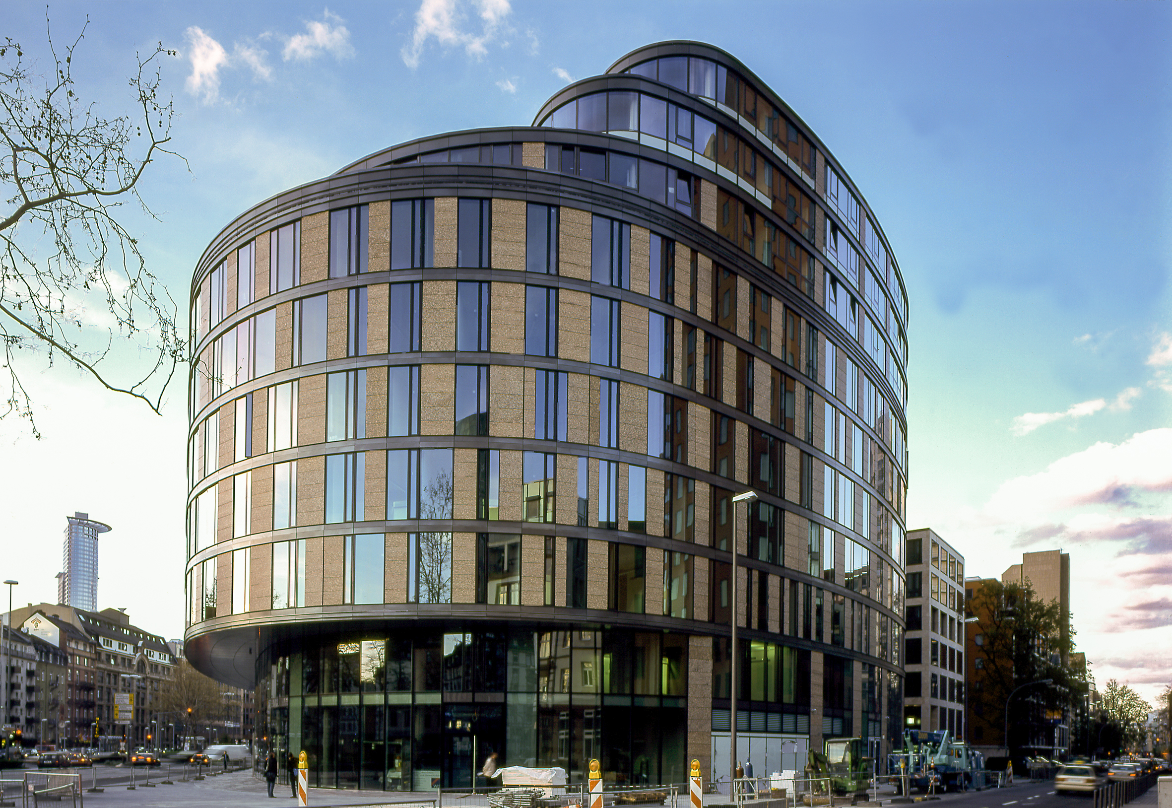 Außenansicht, Oval Baseler Platz